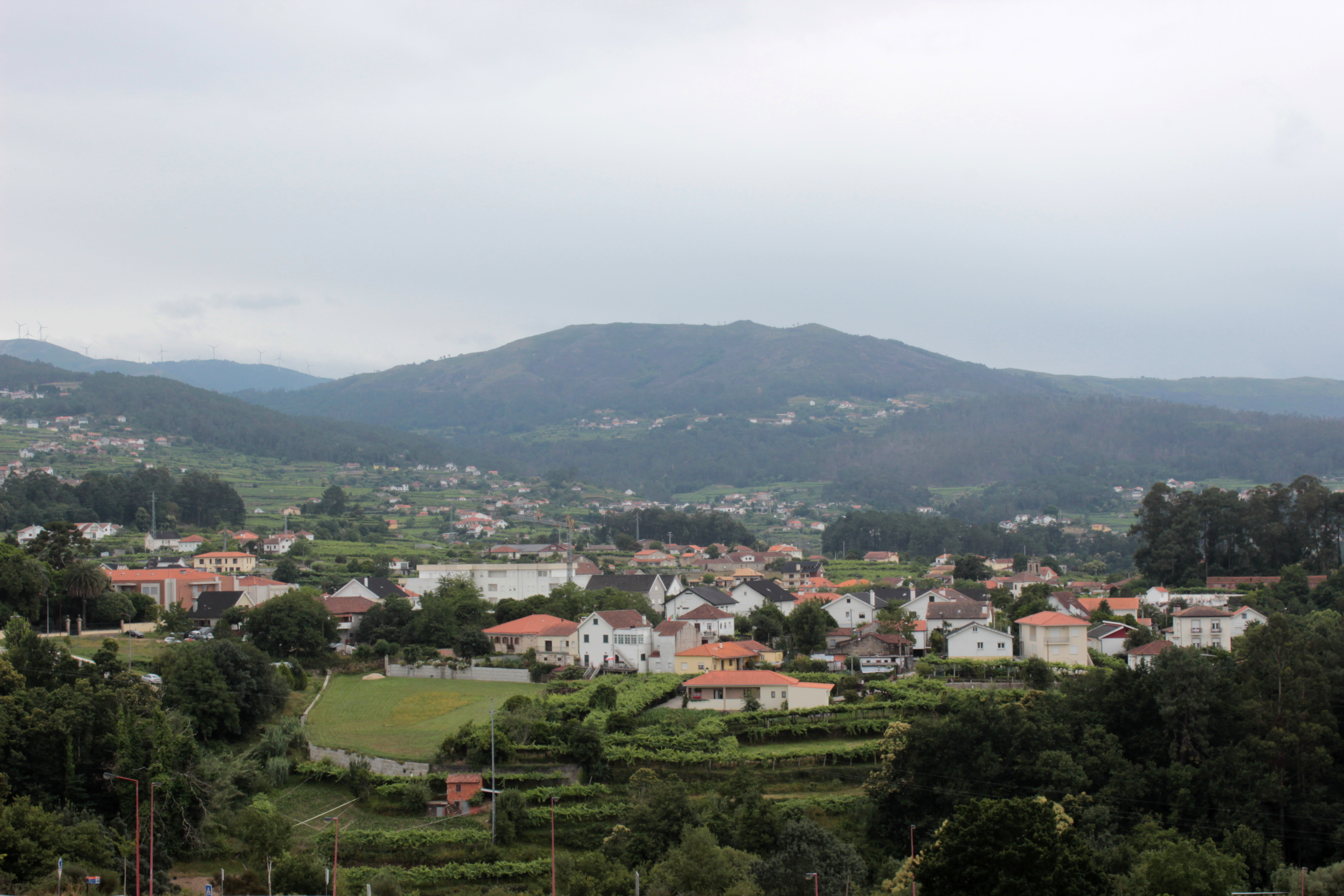 Melgaço